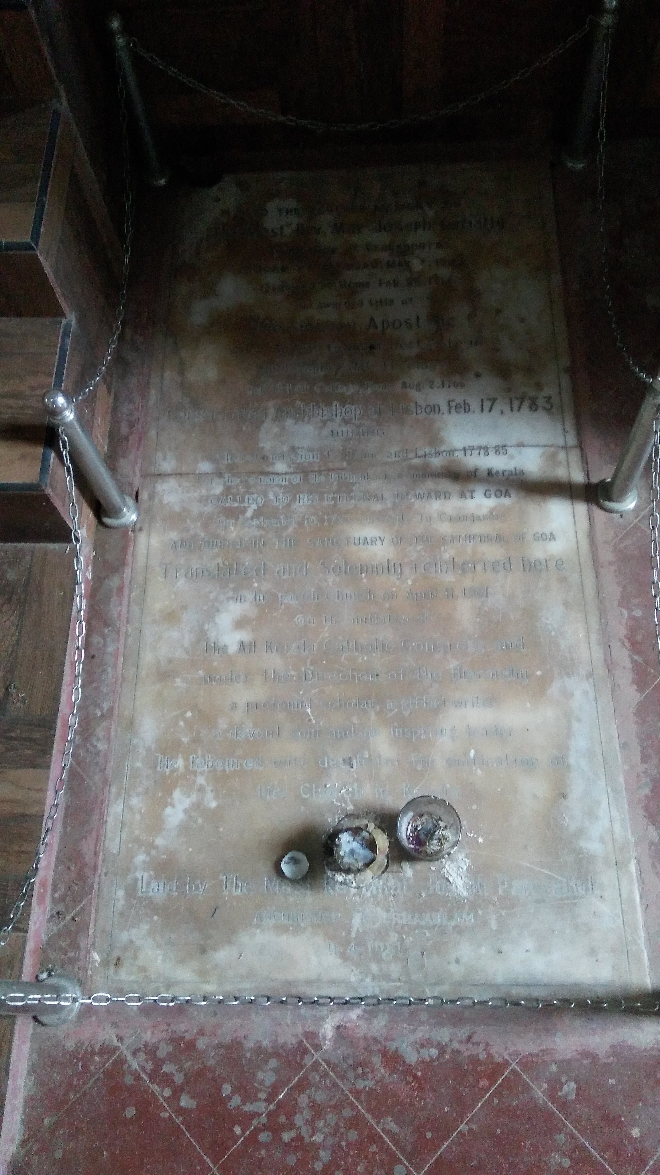 കരിയാറ്റിൽ ഔസേപ്പ് കത്തനാരുടെ കബറിടം